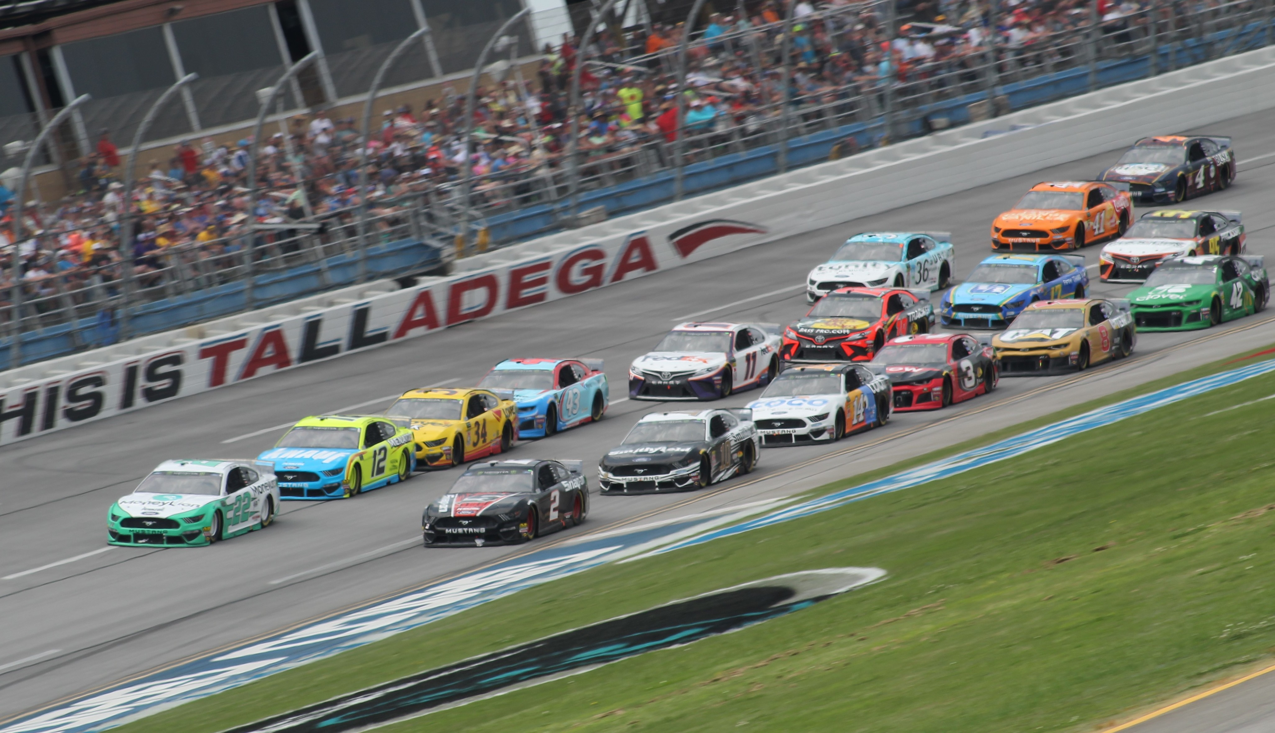 2019 GEICO 500